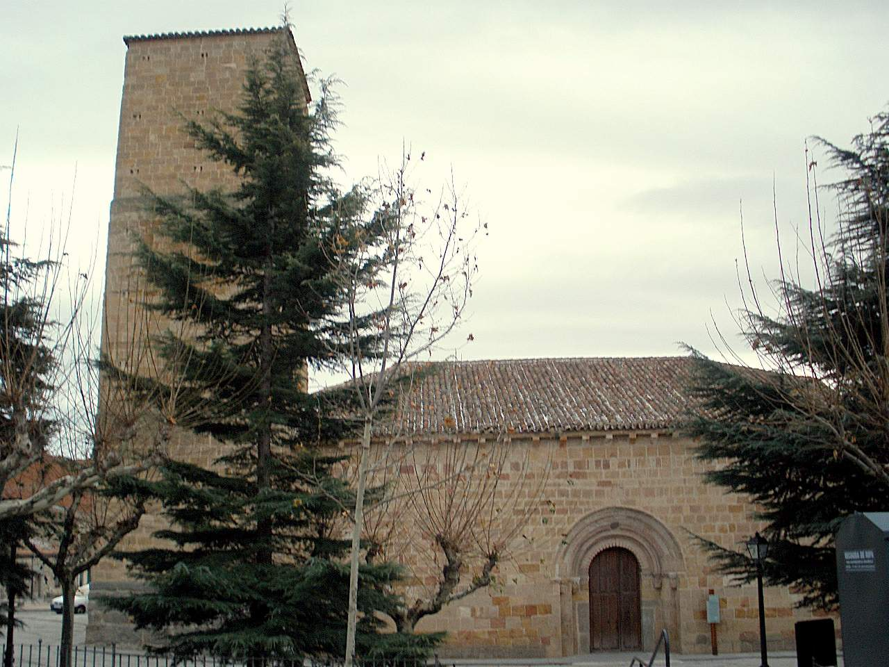 Iglesia de San Nicolás de Bari (Ávila)